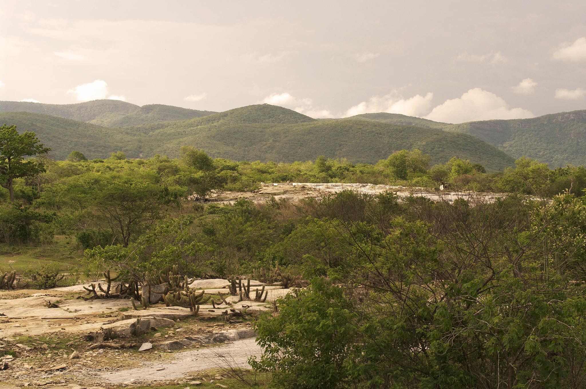 Tirando leite de pedra...